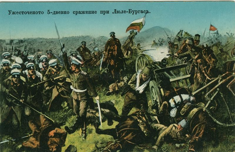 Българска пропагандна картичка за битката при Люлебургас, 1912